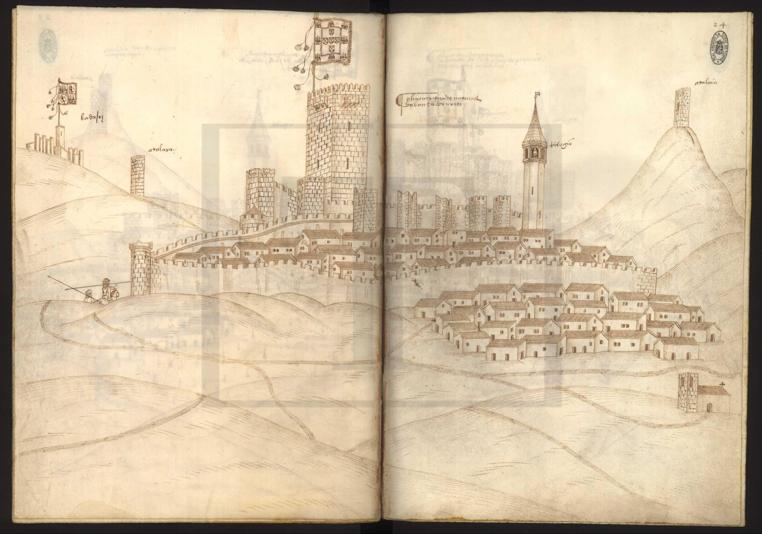 Livro das Fortalezas 24 - Olivença